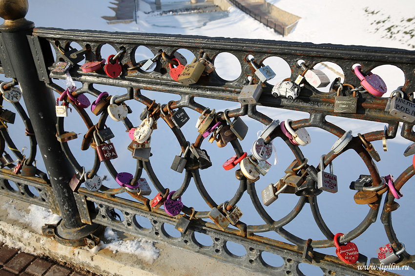 Віцебск.